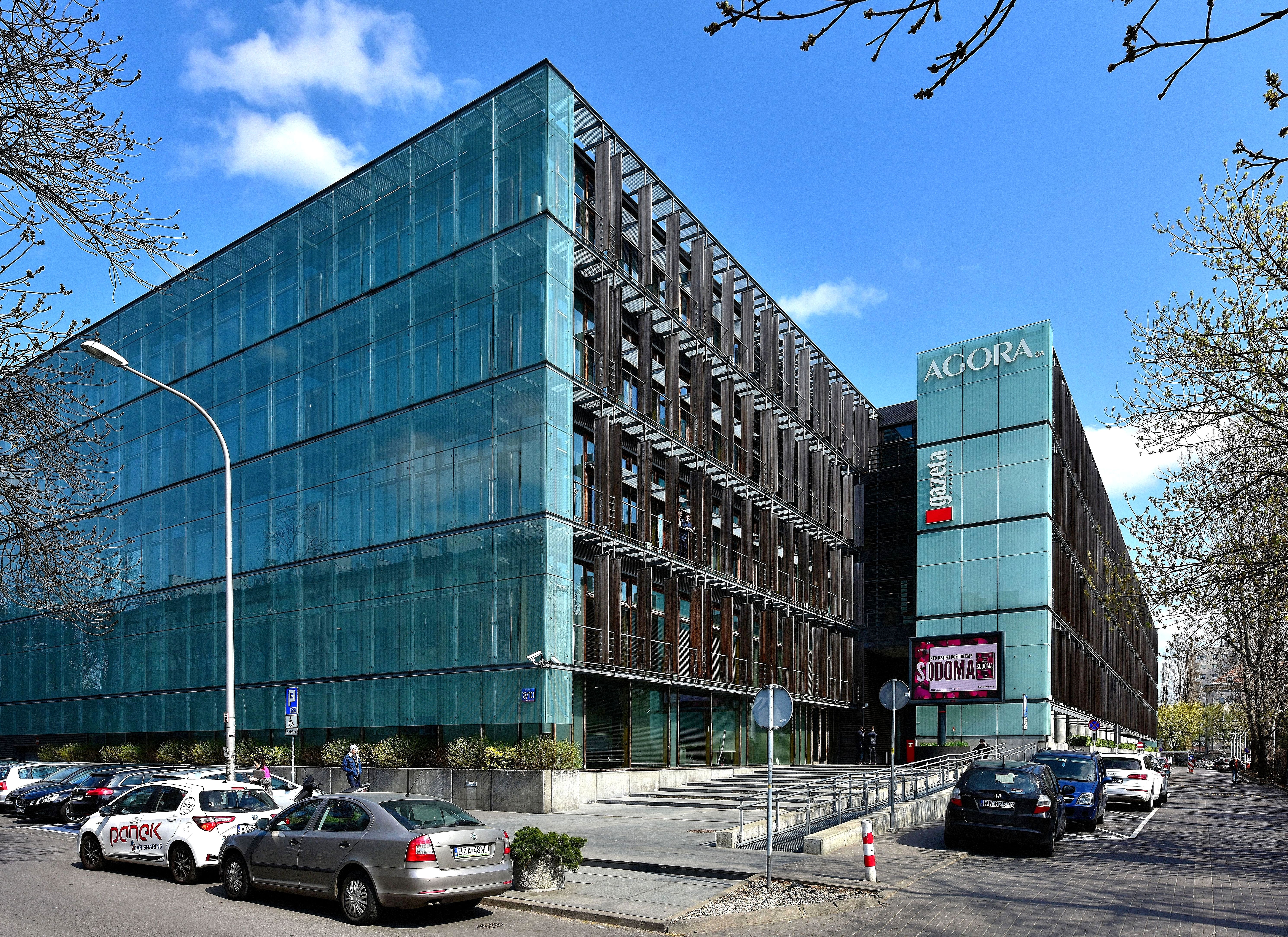 Siedziba Agory S.A. i "Gazety Wyborczej" przy ul. Czerskiej 8/10 w Warszawie